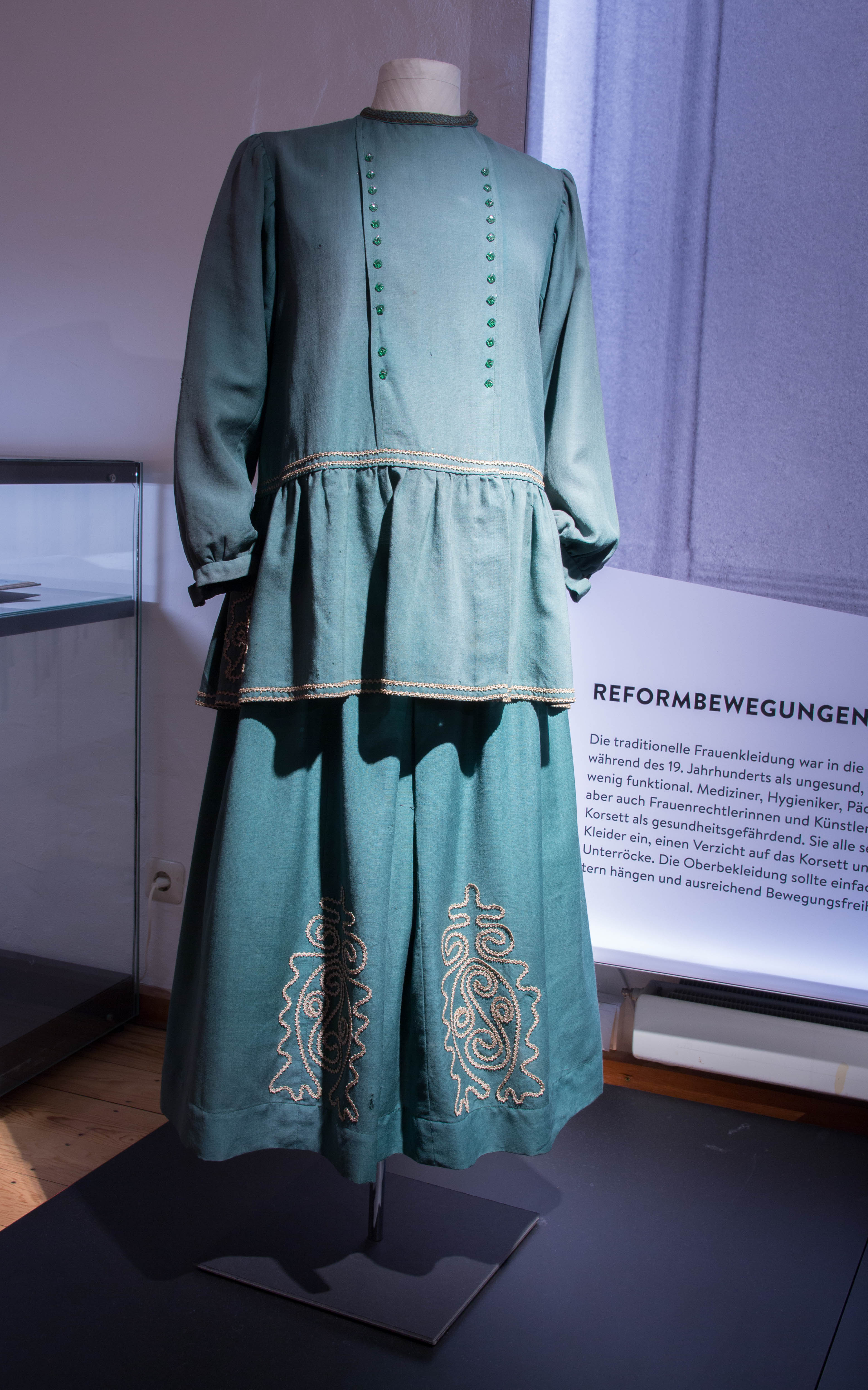 Kleid der Reformbewegung, Ausstellung "Macht der Mode", Textilfabrik Cromford; Leihgabe: LWL Industriemuseum